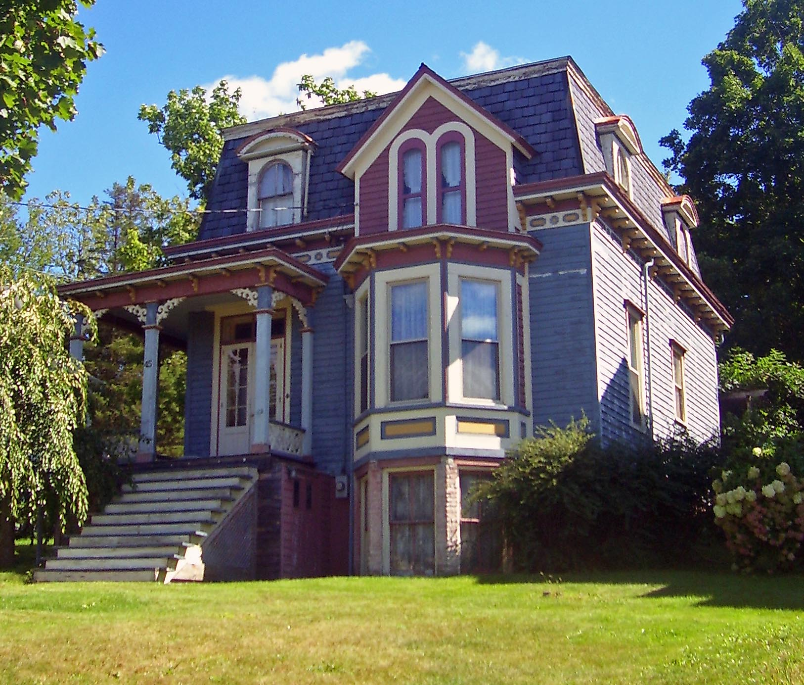 John R. Hayes House in Walden, NY, USA